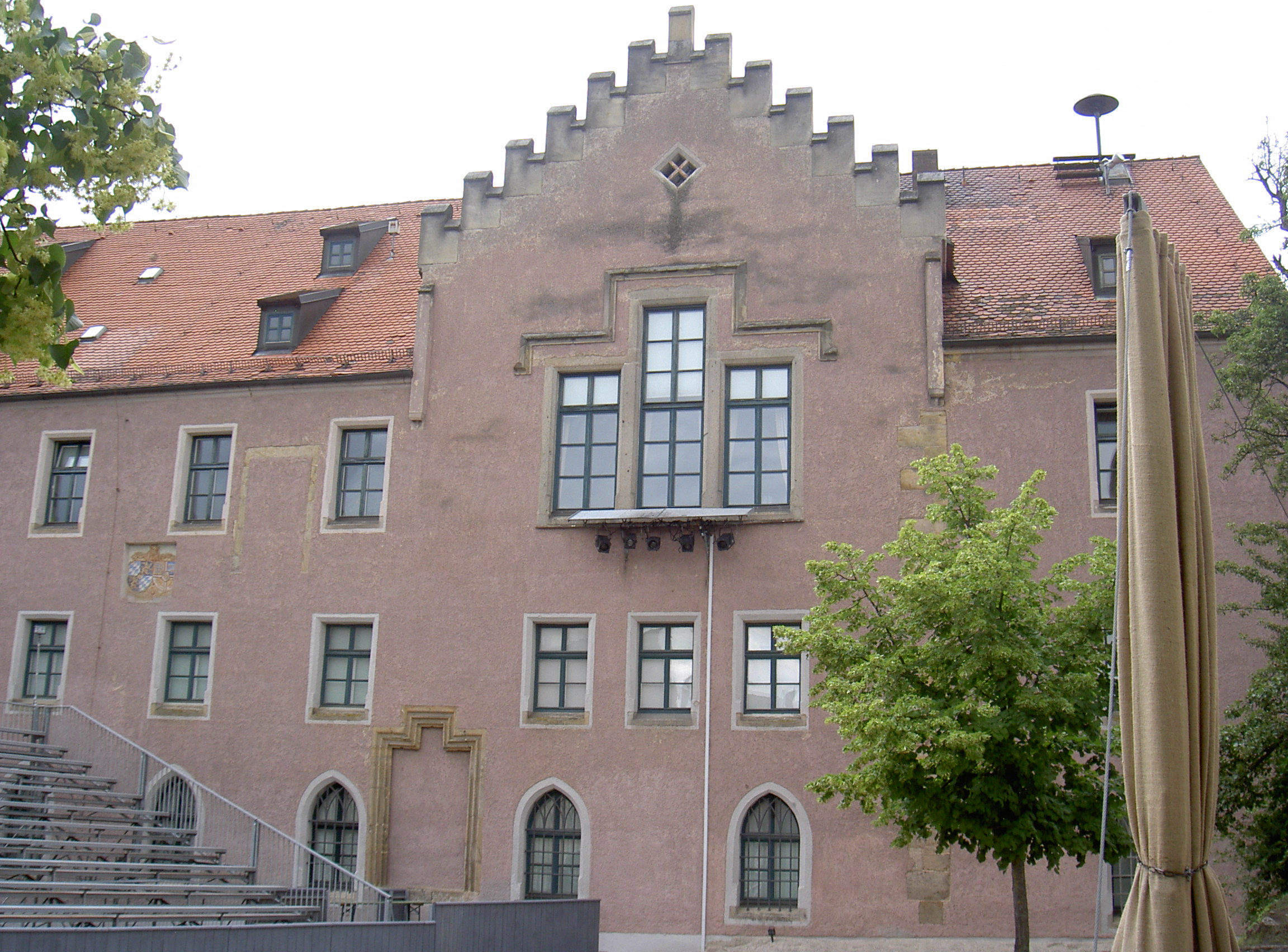 Altes Schloss (Neunburg vorm Wald)